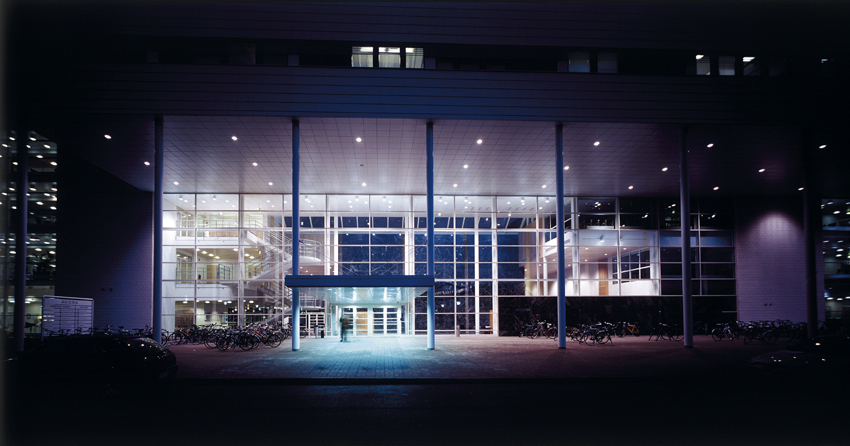 Jyväskylän Yliopiston AGORA